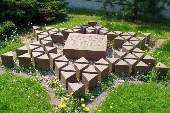 Bild zeigt das Denkmal für die ehemaligen jüdischen Schülerinnen der Elisabethschule.